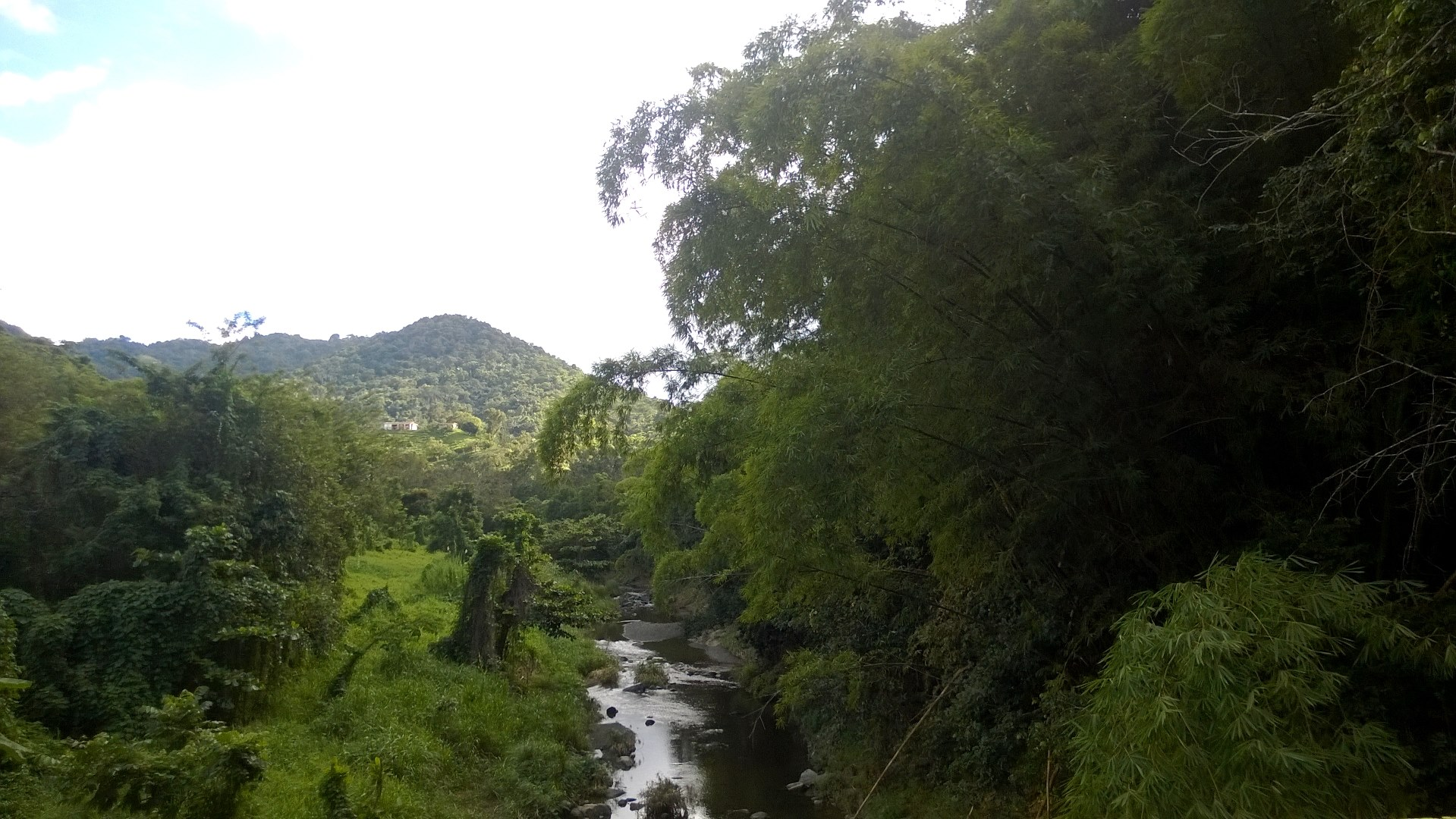 Río Arroyata, Comerío, Puerto Rico (2015)